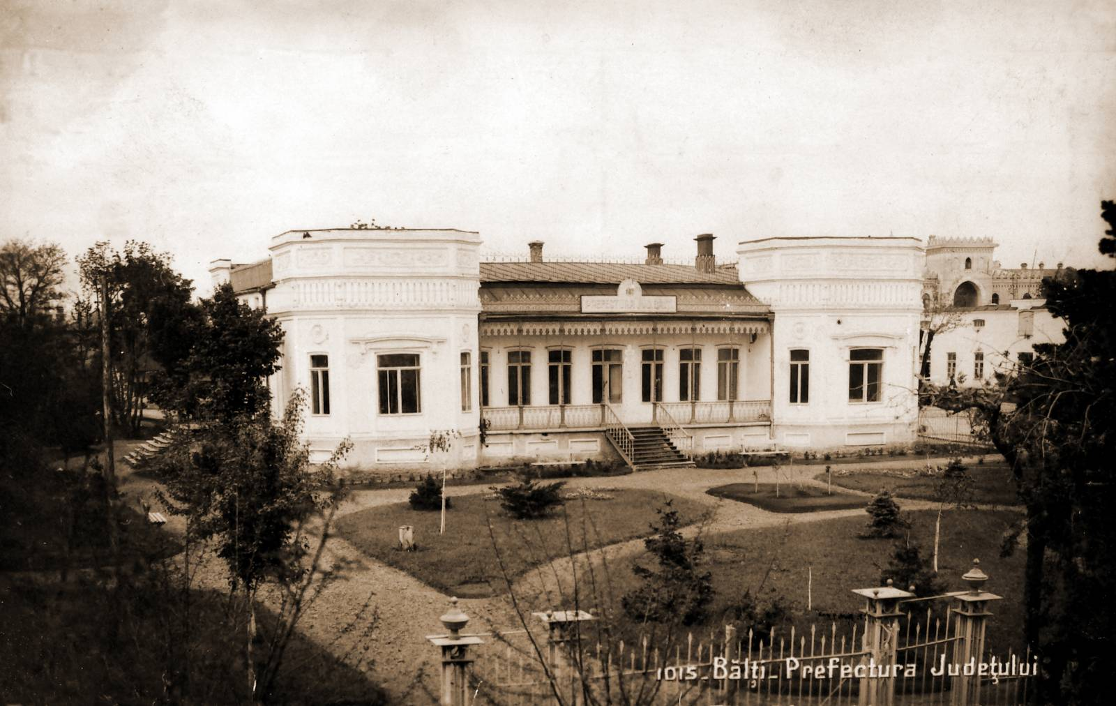 Clădirea Oficiului Stării Civile din Bălţi în perioada antebelică, fosta prefectură a judeţului Bălţi.